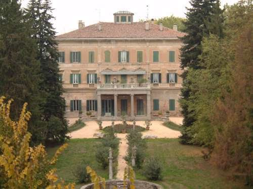 VillaDelleRoseNoviDiModena